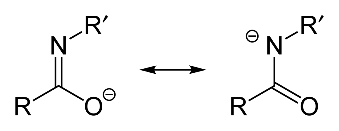 Resonance structures of a general amidate (amide enolate)